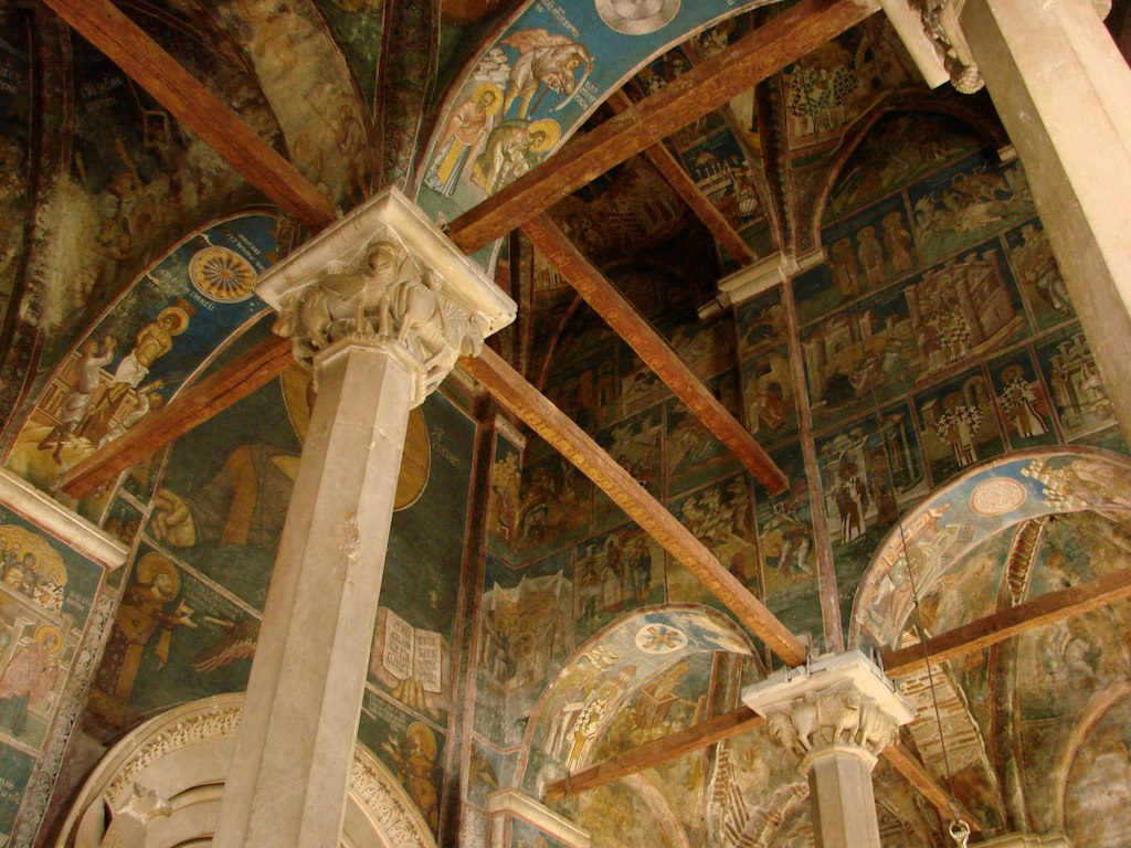 Visoki Dečani, interior, looking up.